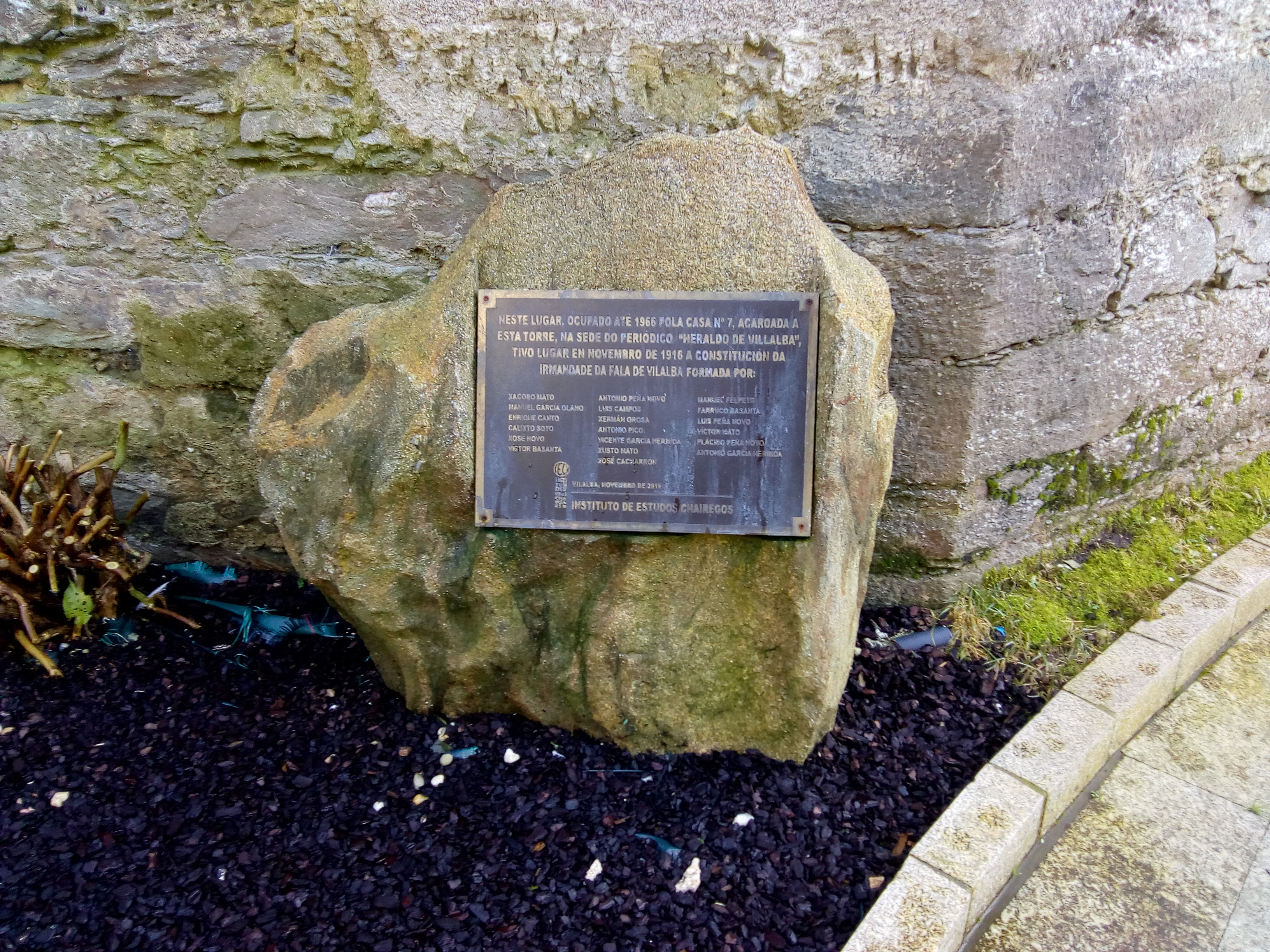 Praca no lugar da sede do Heraldo de Villalba para conmemorar a constitución da irmandade da fala de Vilalba